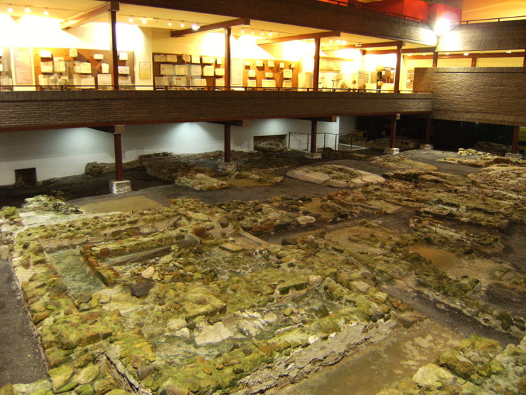 Necrópolis paleocristriana de San Antón en Cartagena (España). Alrededor de la misma se construyó el Museo Arqueológico Municipal de Cartagena. [1]